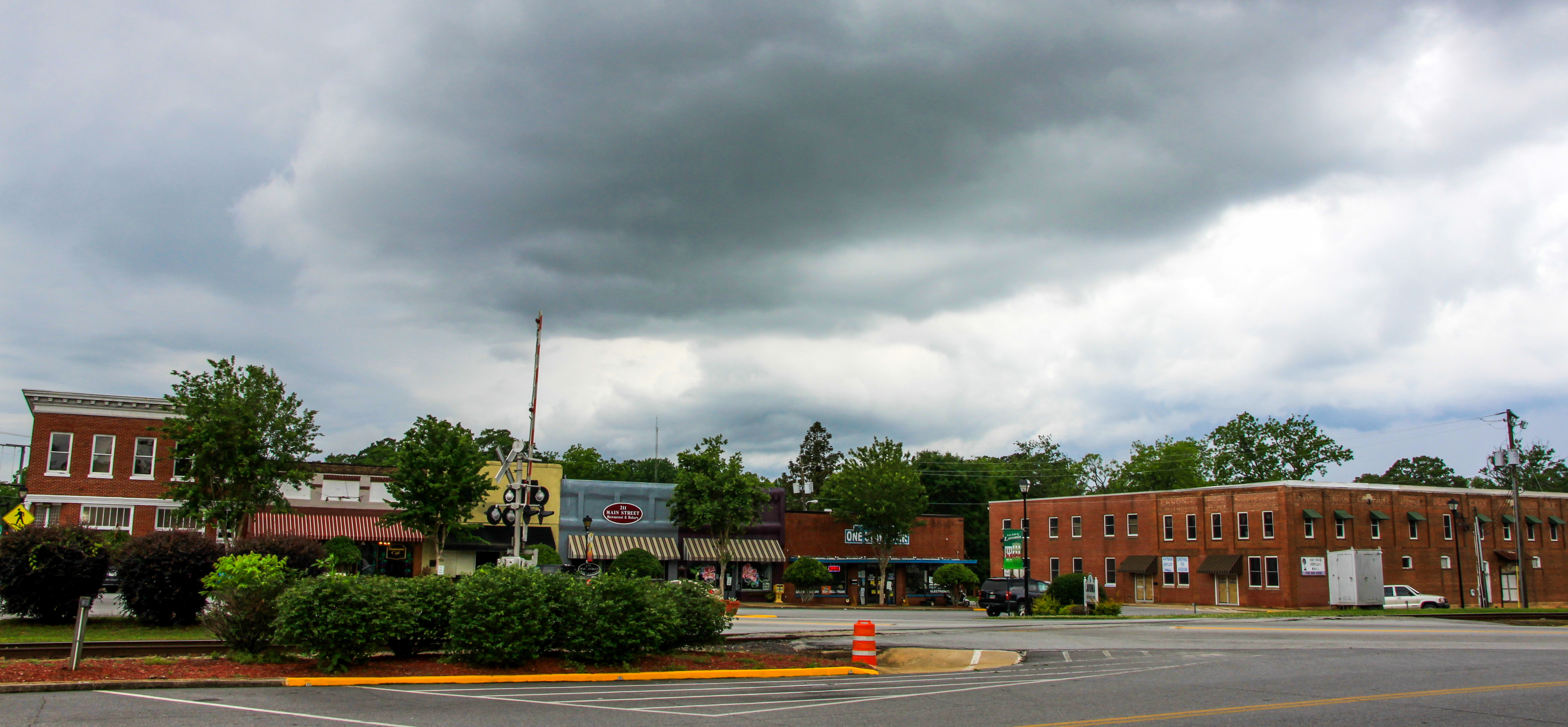 Georgia - Lavonia - Main Street